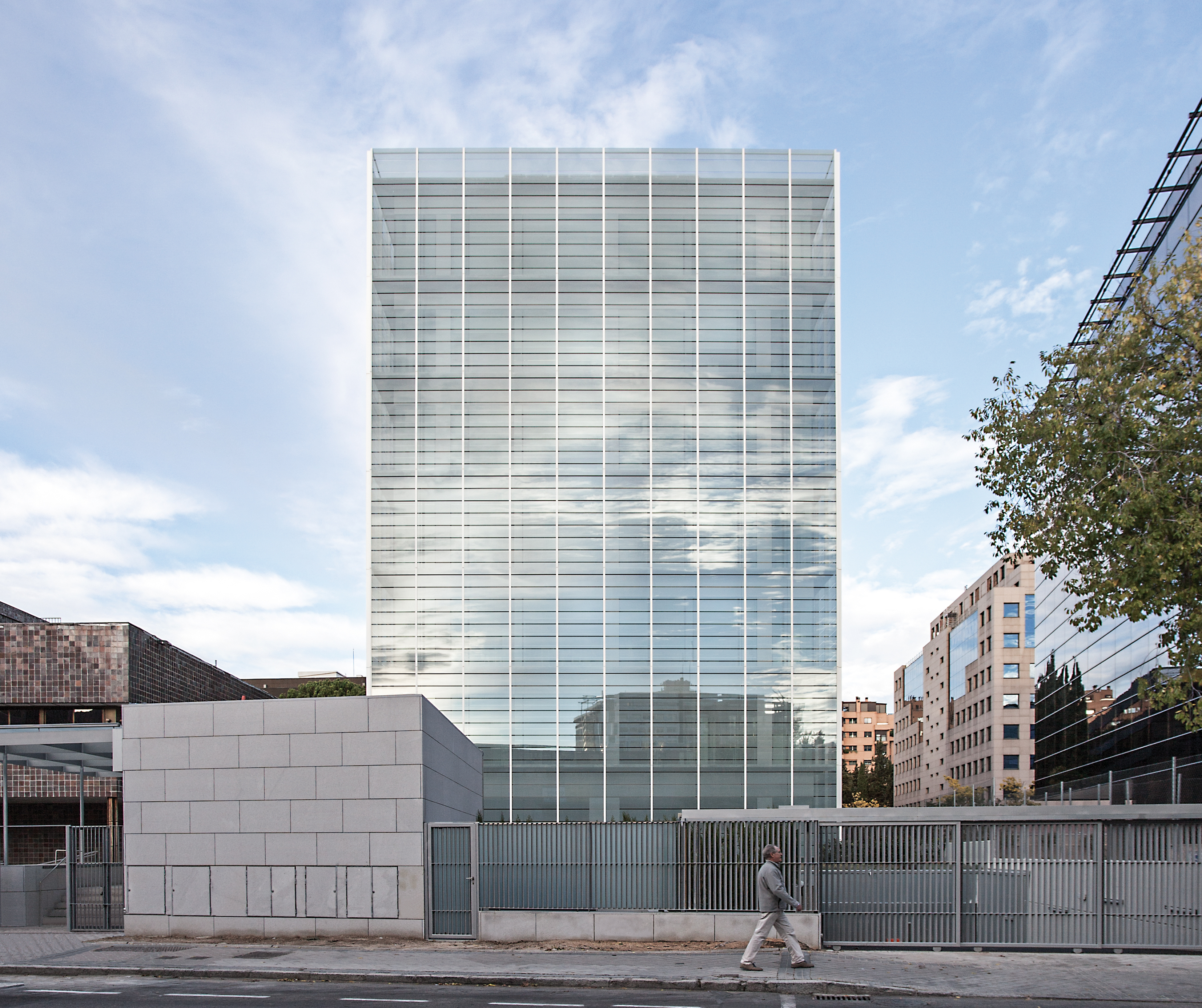 Edificio de oficinas para el Ministerio de Economía y Hacienda en Madrid. Fotógrafo: Pablo Bayón